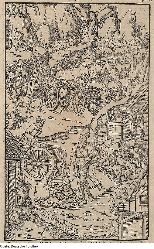 Original image description from the Deutsche Fotothek Bergwerk & Bergbau & Hunt & Karren